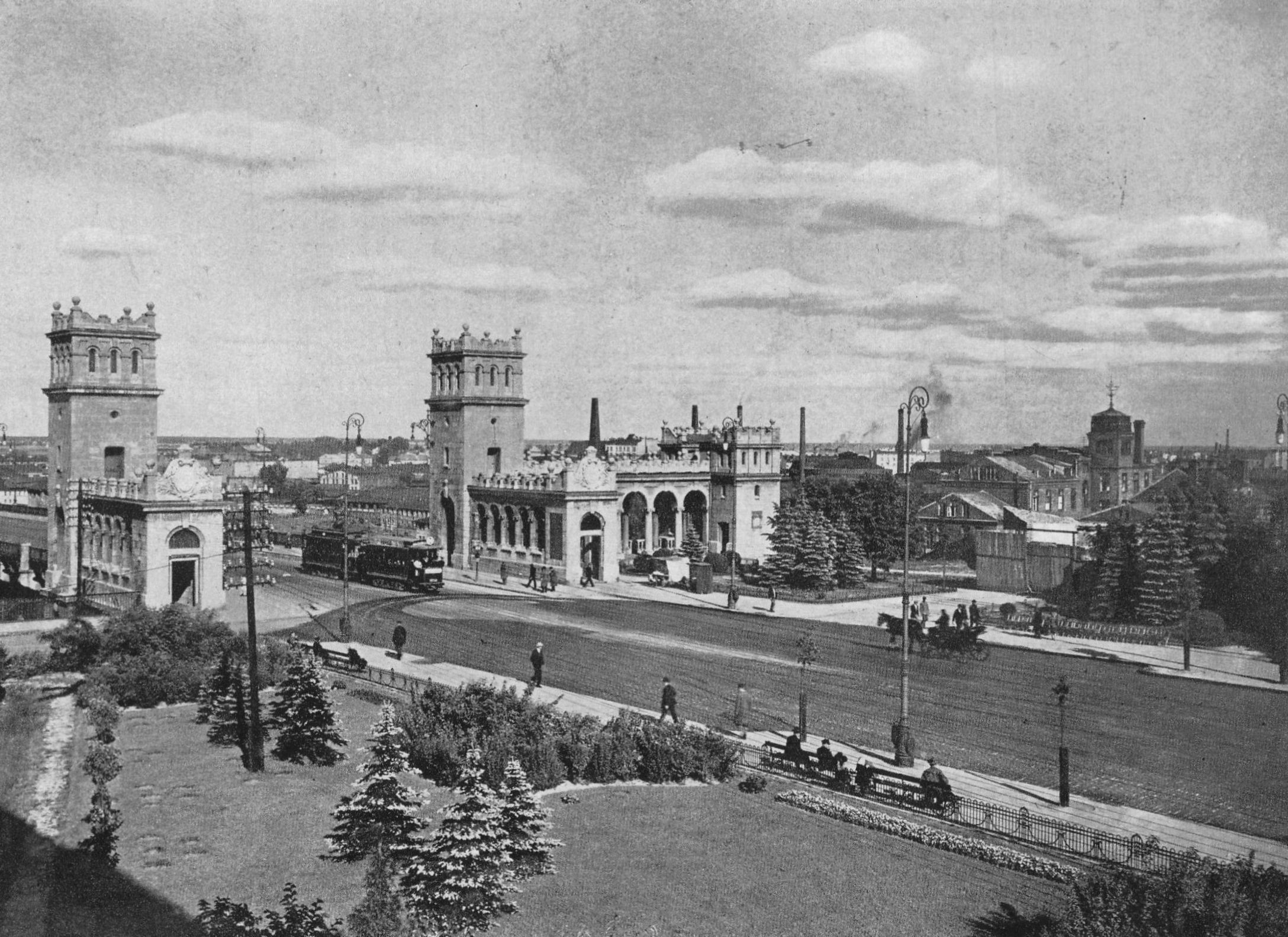 Wjazd na most Poniatowskiego w Warszawie